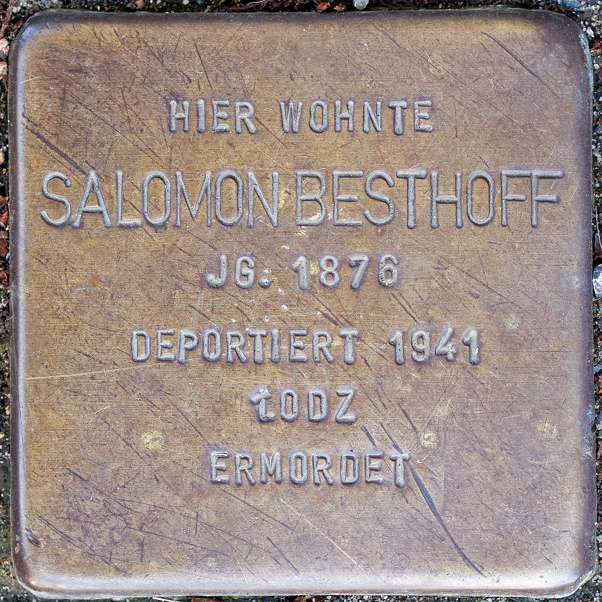 Stolpersteine MG: Besthoff, Salomon